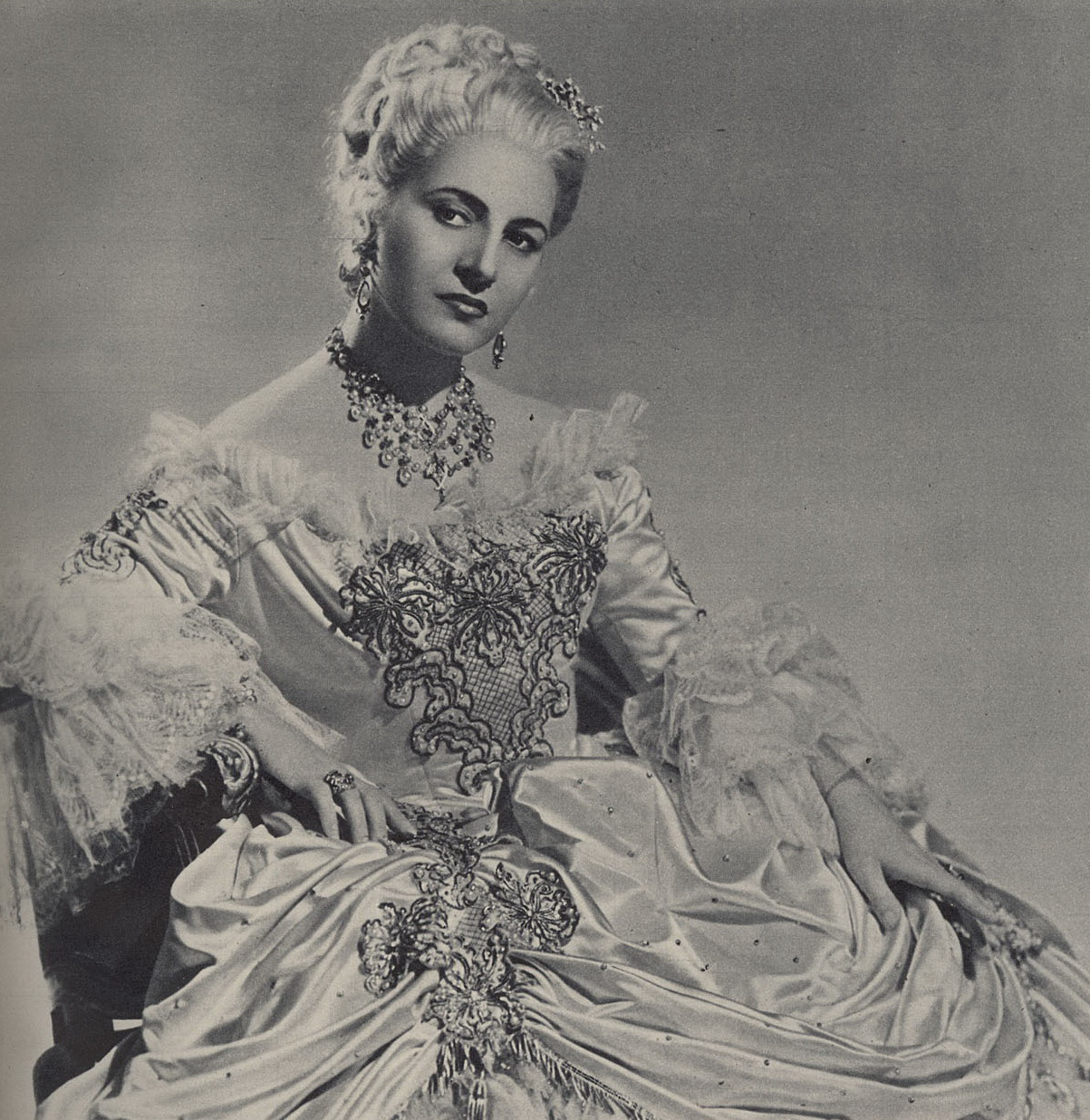 Italian soprano singer Clara Petrella in the opera Manon Lescaut (Stagione Lirica della Radiotelevisione Italiana, Milan)